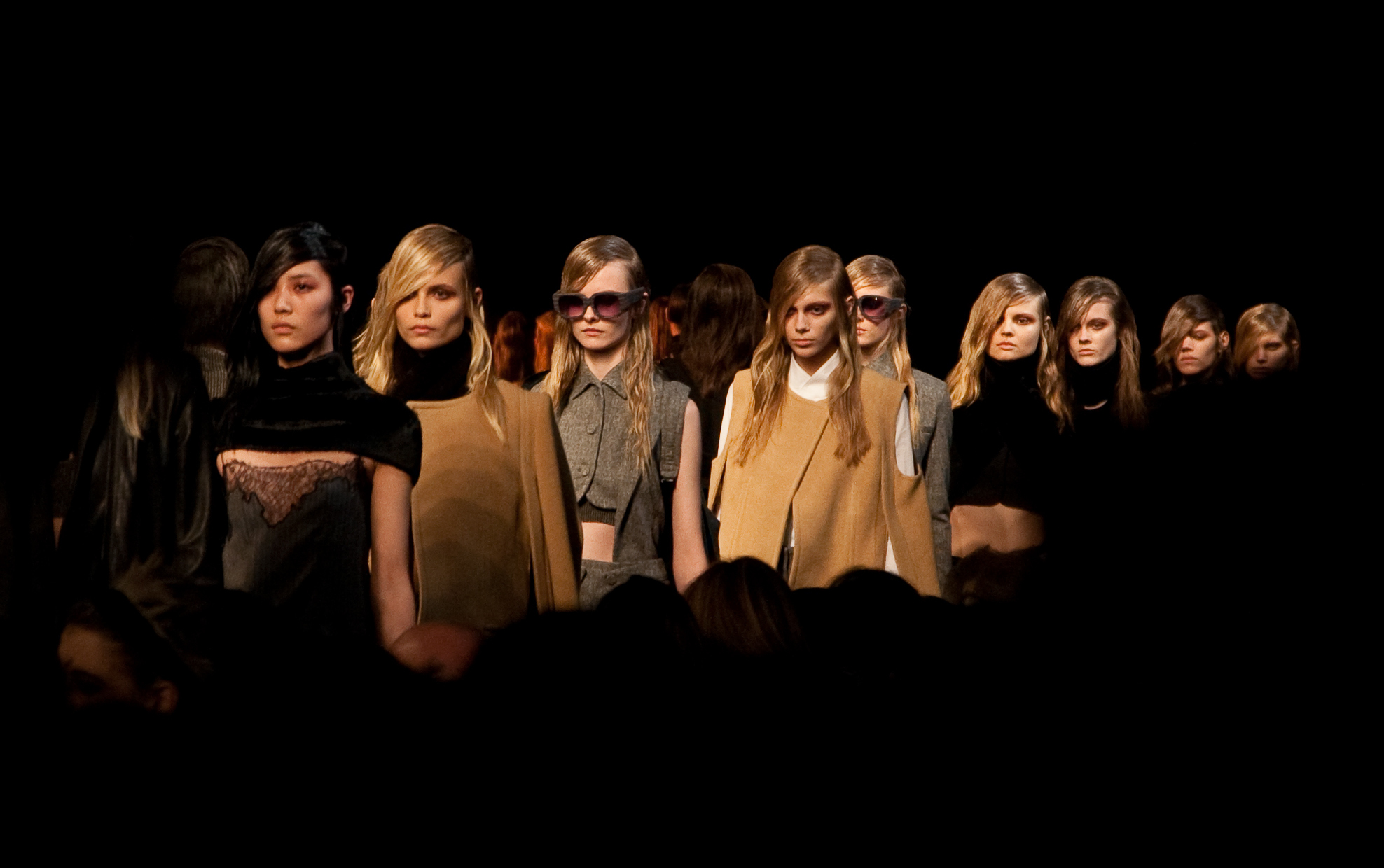 Alexander Wang FW10